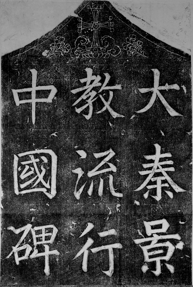 大秦景教流行中国碑碑額拓本。